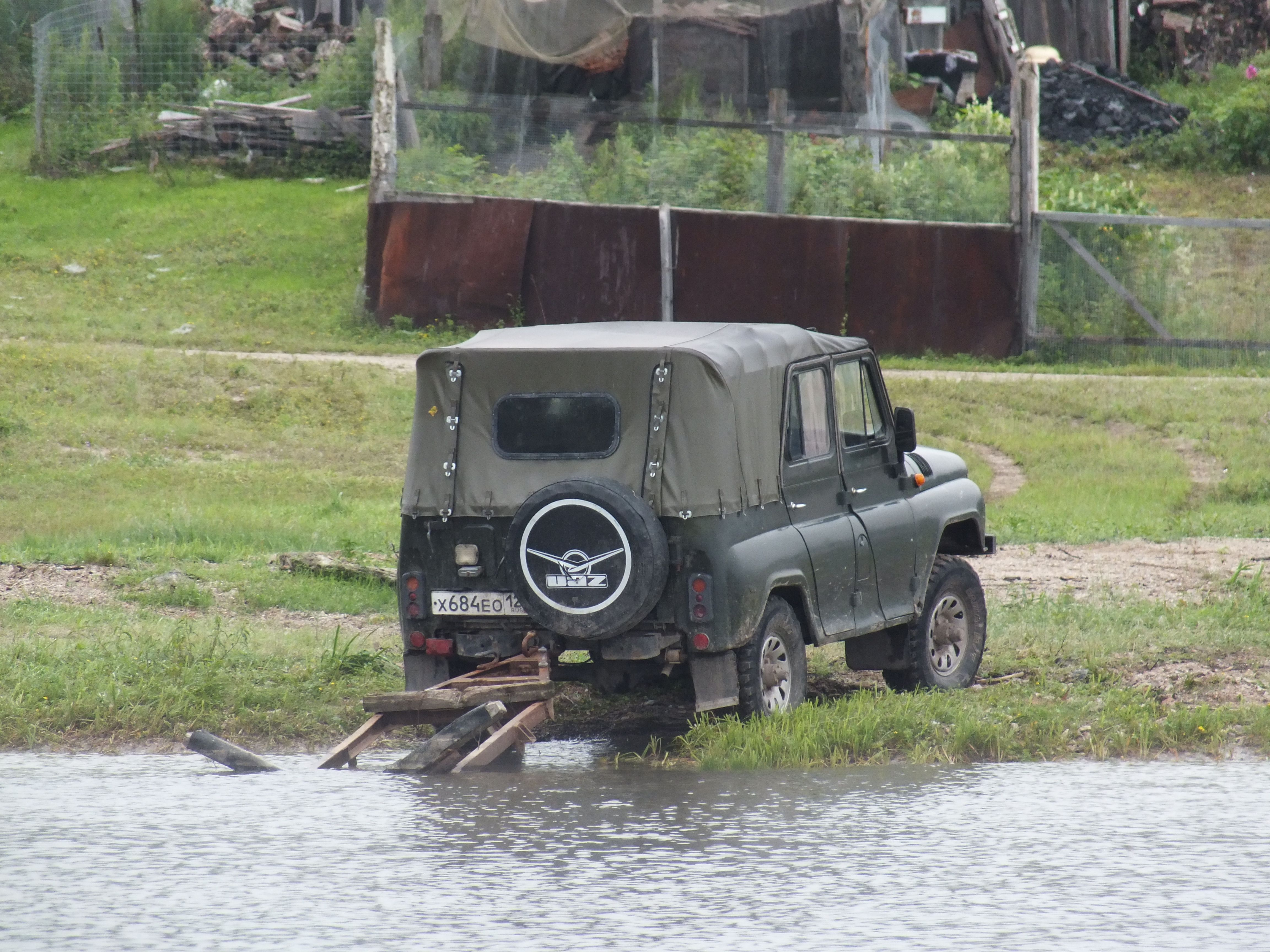 Лодочный прицеп, село Веселый Яр